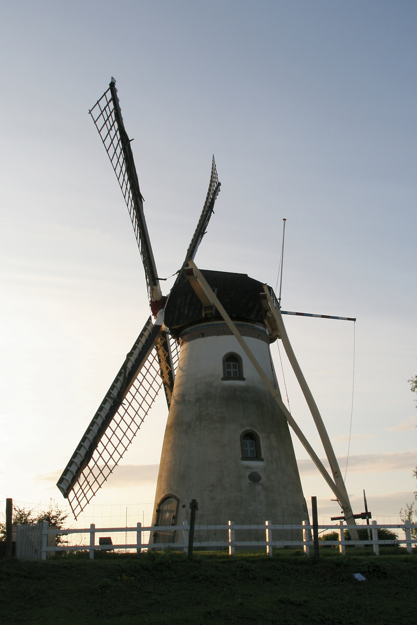 Herkingen: De Dankbaarheid bij avond